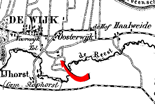 Fragment omgeving de Wijk en IJhorst van een kaart van de Wijk (de locatie van Dunningen door mij met rode pijl gemarkeerd)